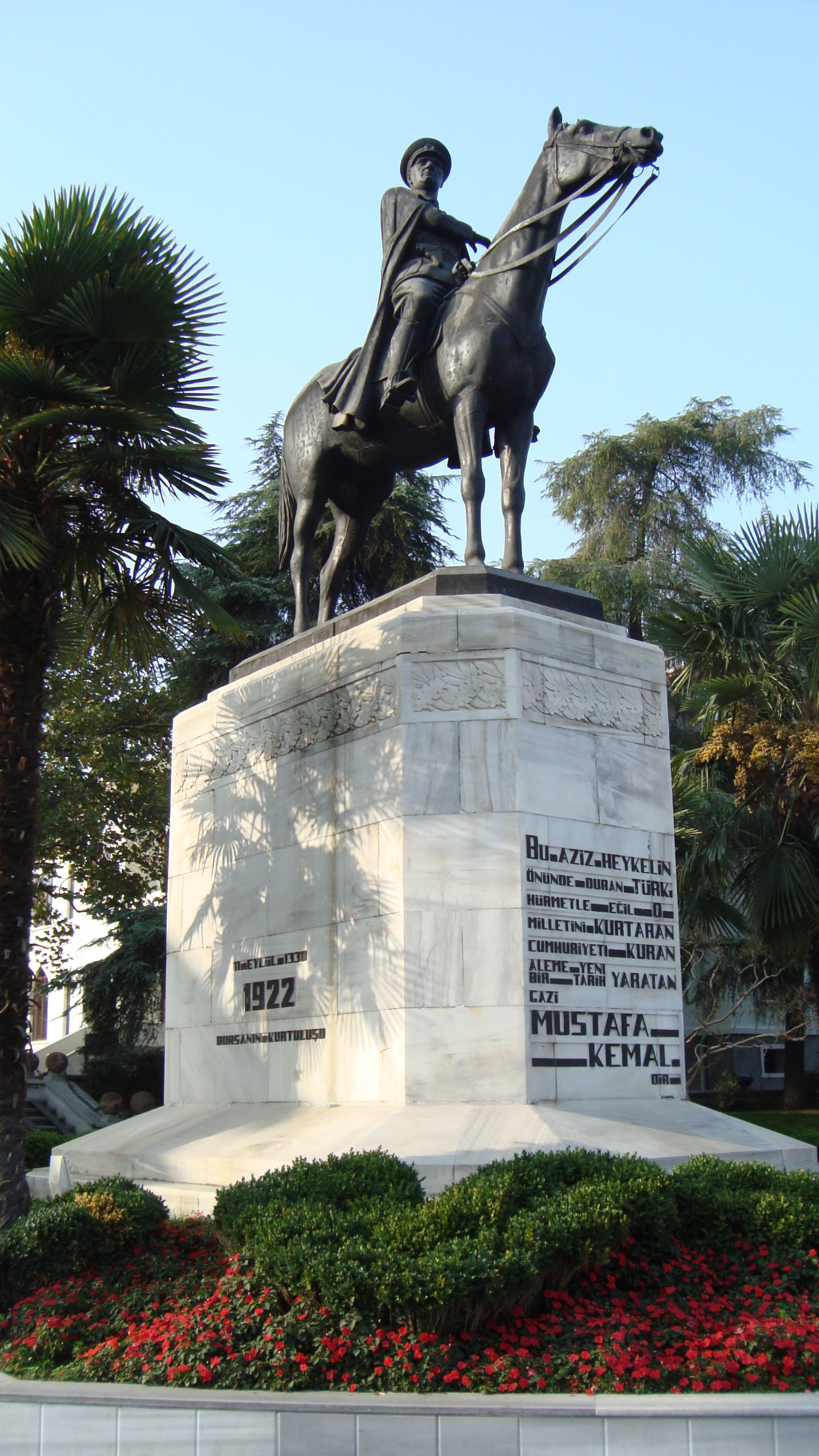 ATATÜRK ANITI